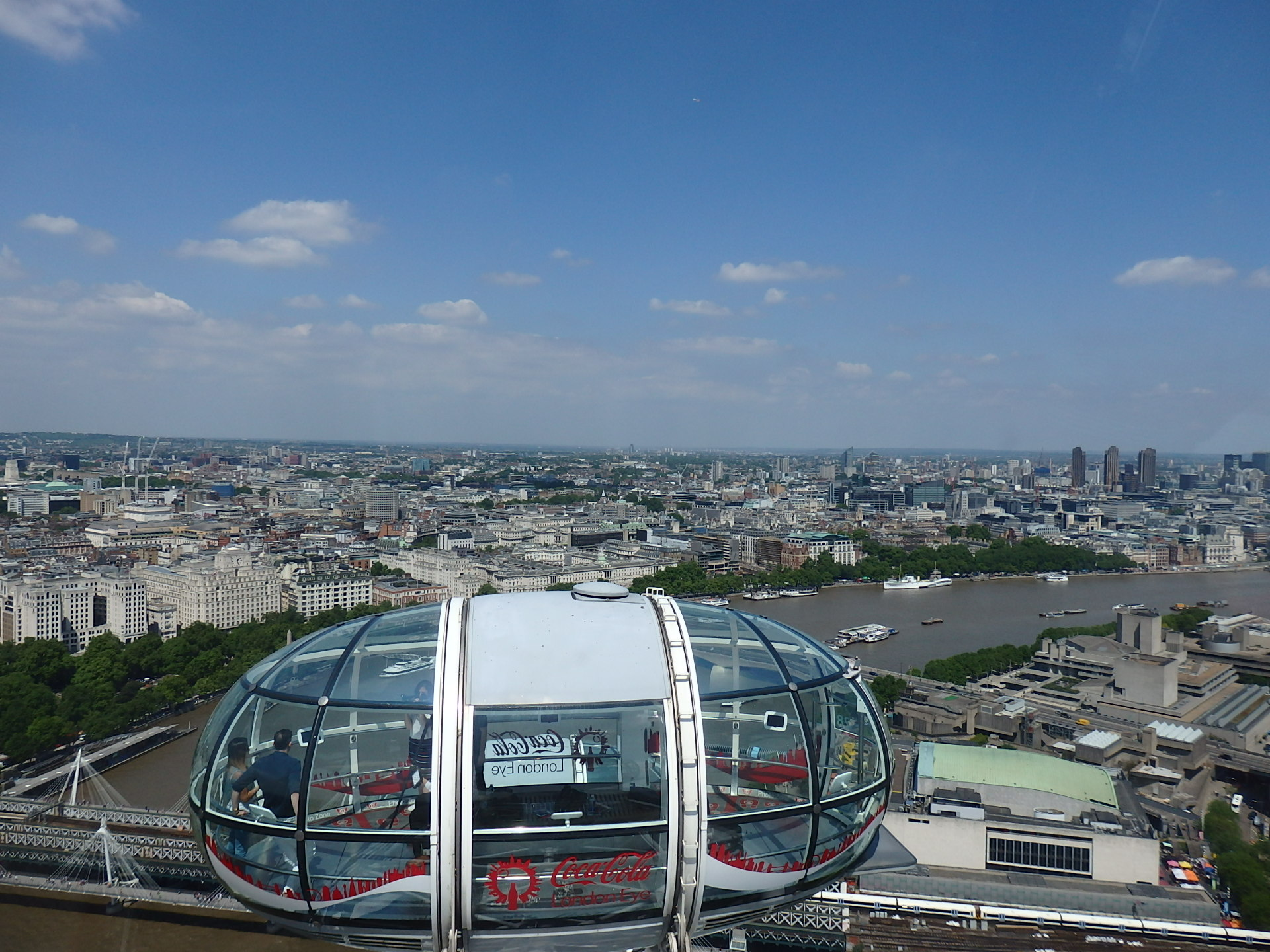 Blick von oberer Kabine des London eye auf darunter kommende